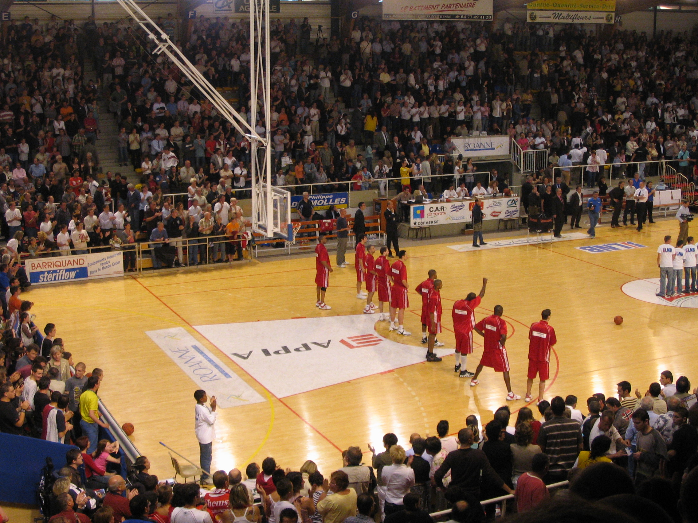 Avant-match halle André Vacheresse, Roanne (Loire) -- le club local de la Chorale reçoit Strasbourg IG pour le compte du championnat de France de basket Pro A, saison 2006-07.